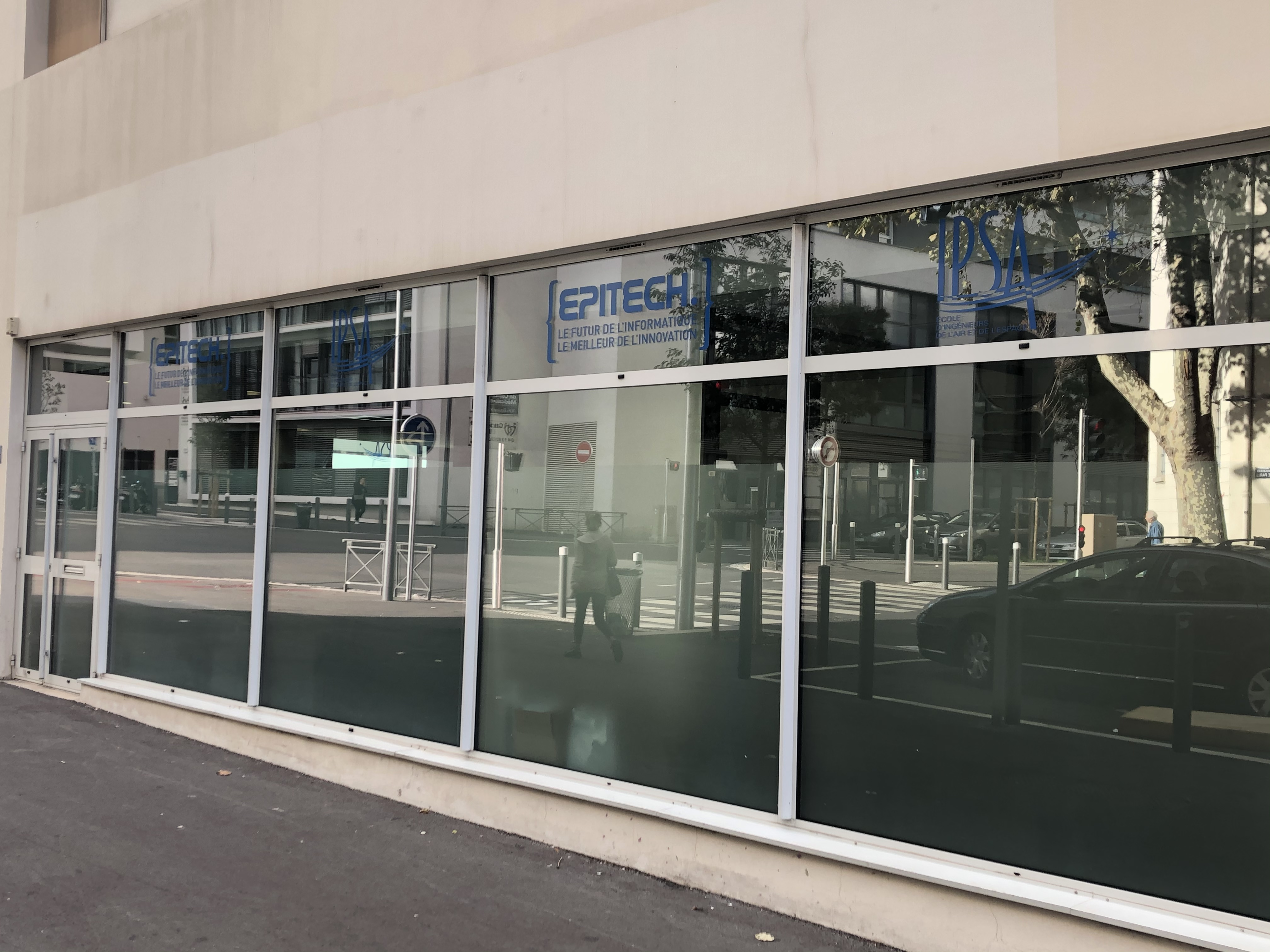 Campus marseillais de l’Institut polytechnique des sciences avancées